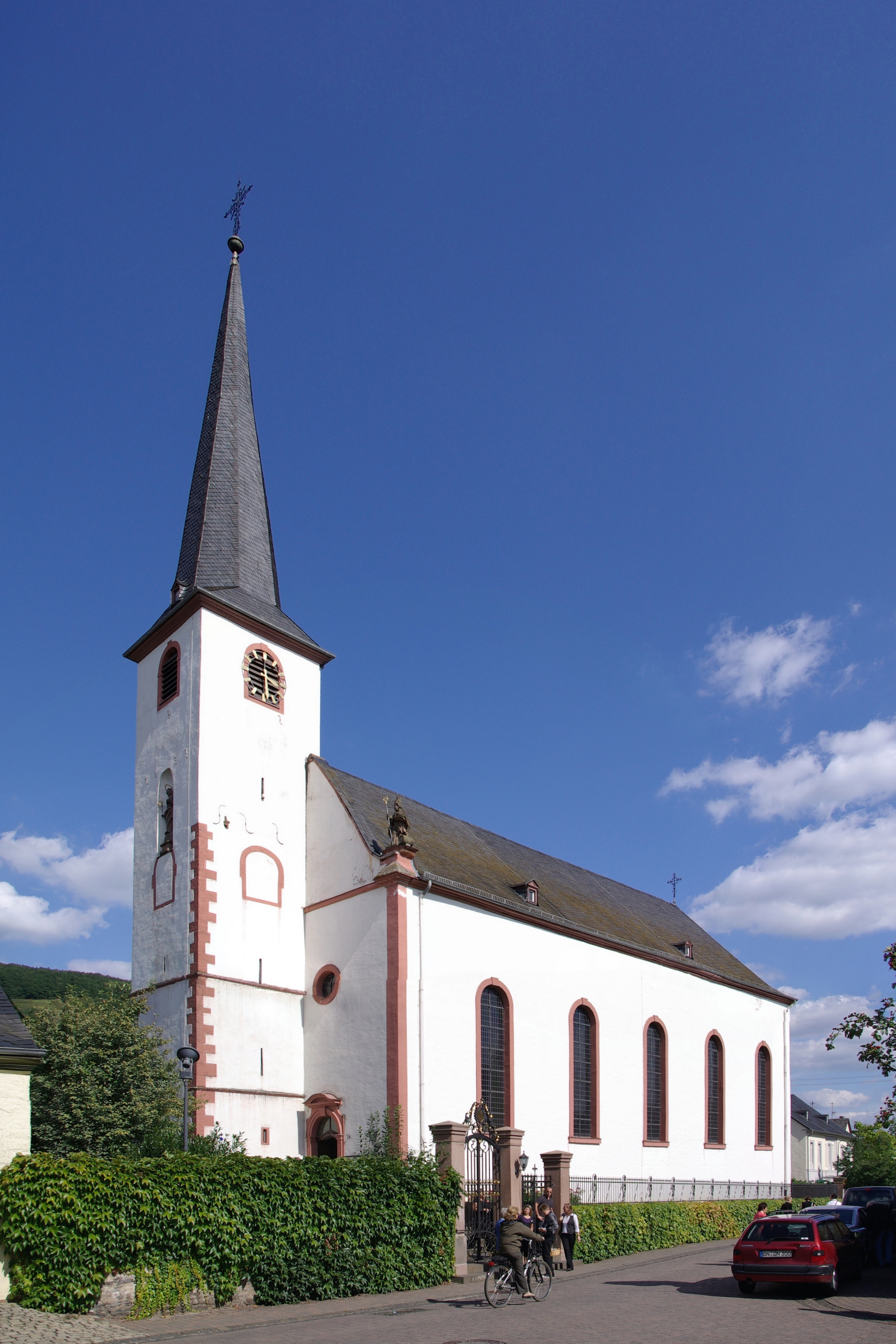 Katholische Pfarrkirche St. Laurentius; romanischer Westturm, barocker Saalbau, 1771; zugehörig ummauerter Kirchhof mit Rokoko-Tor, Friedhofskreuz 1829, Grabplatte 1496, Epitaph, um 1570, klassizistische Grabsäule, 1838, Grabstein 1775